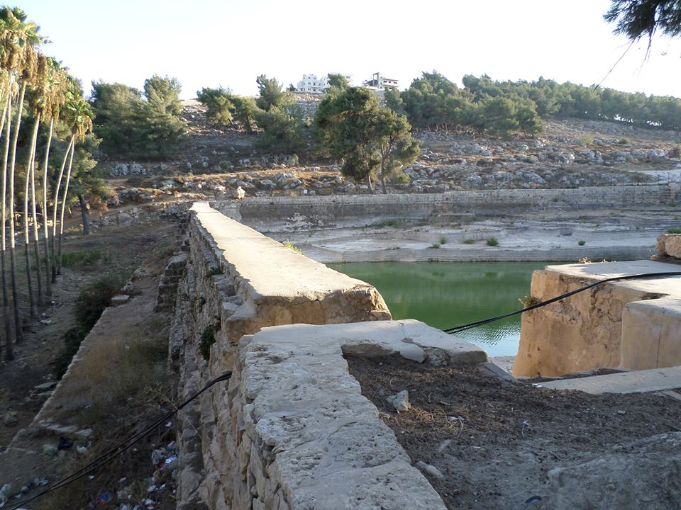 صورة تظهر البناء القديم لبركة السلطان في مدينة الخليل